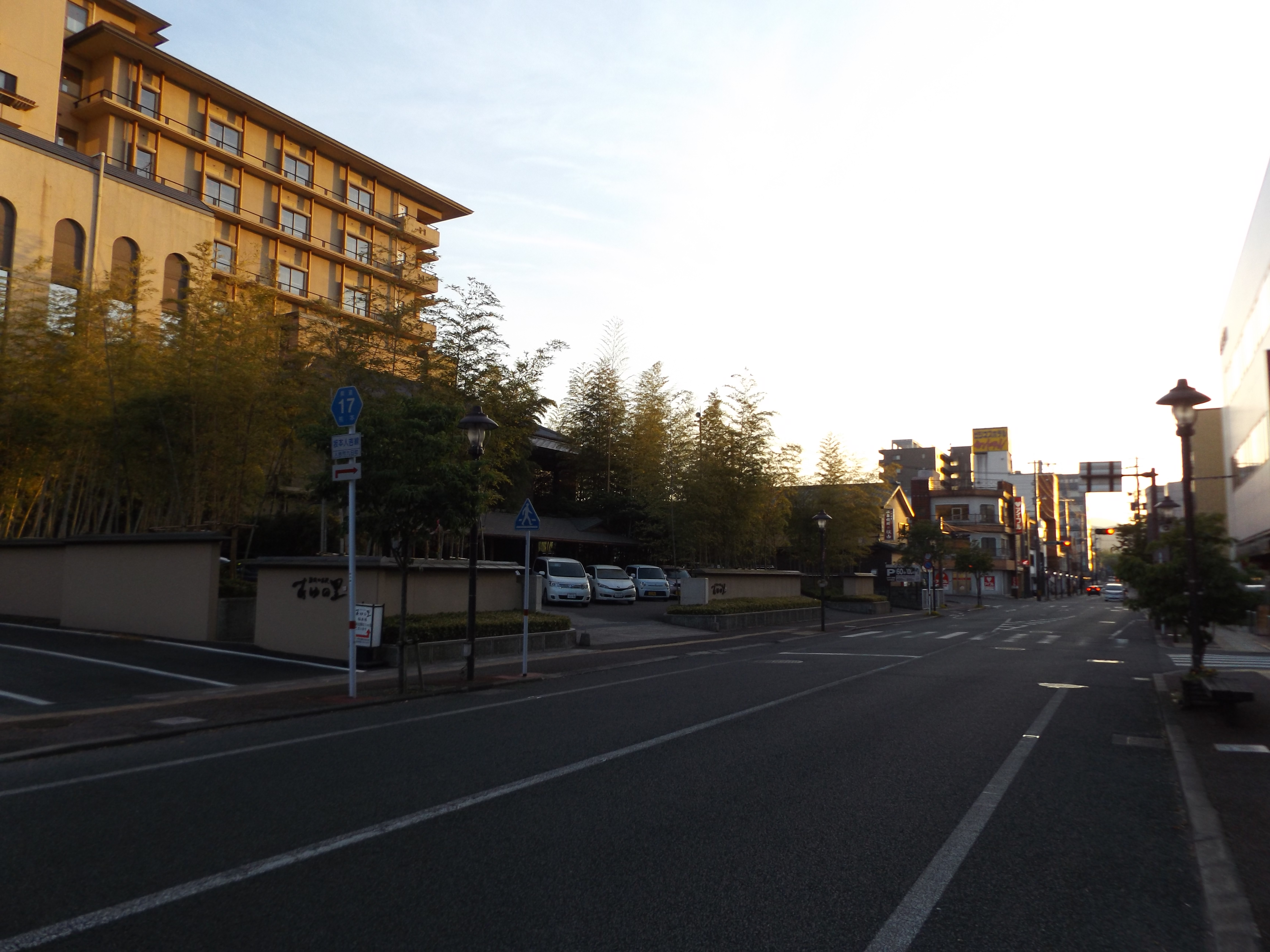 熊本県人吉市九日町にある国道445号と熊本県道17号坂本人吉線の交点。 熊本県道17号はここが終点である。